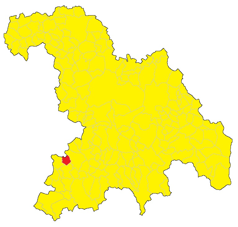 Mappa del comune di Terzo (AL)